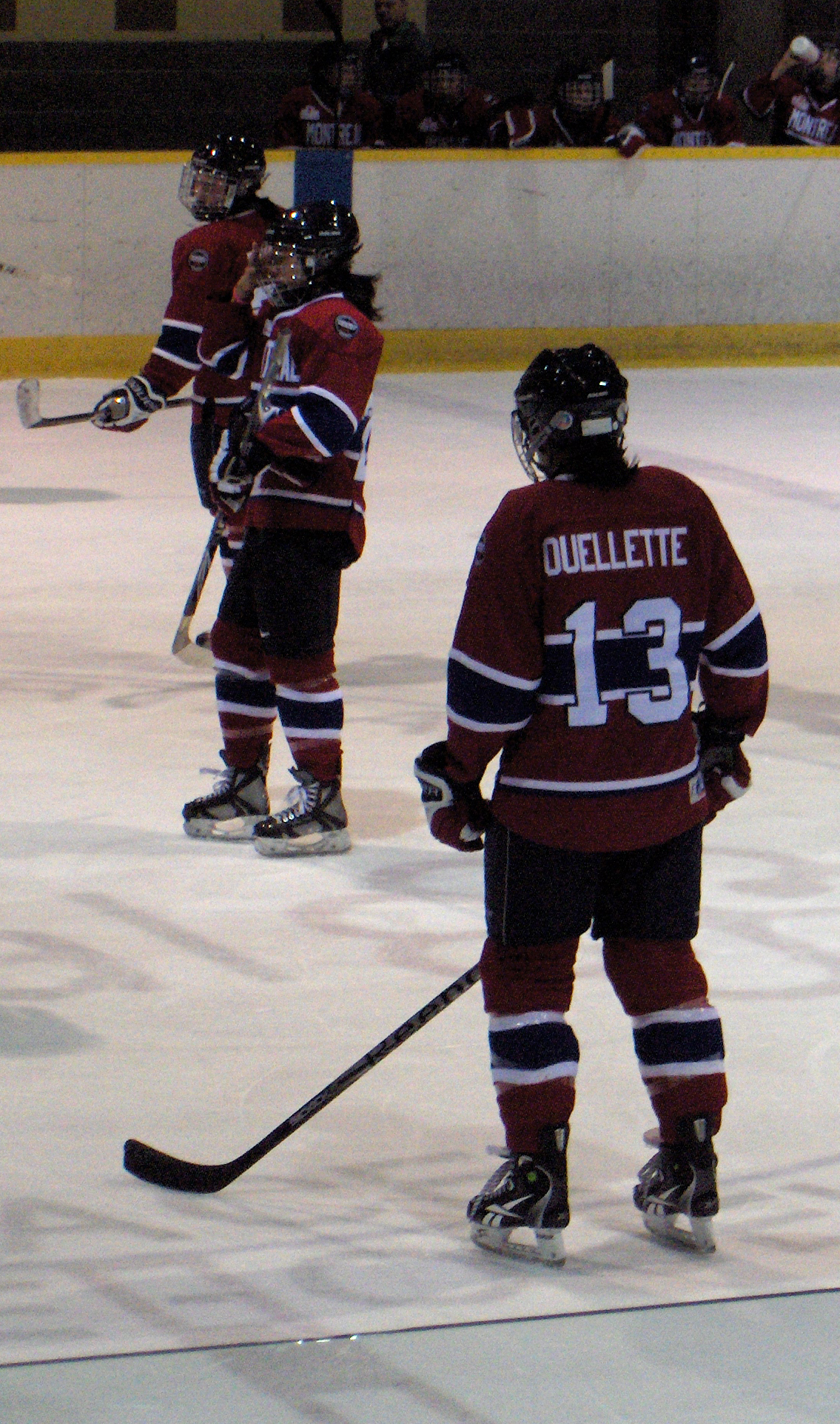 Caroline Ouellette joueuse des Stars de Montréal